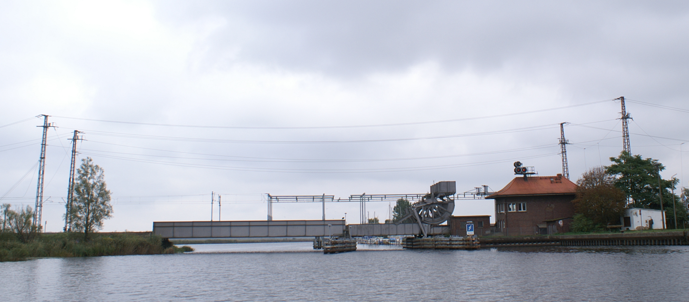 Eisenbahnbrücke über die Peene bei Anklam